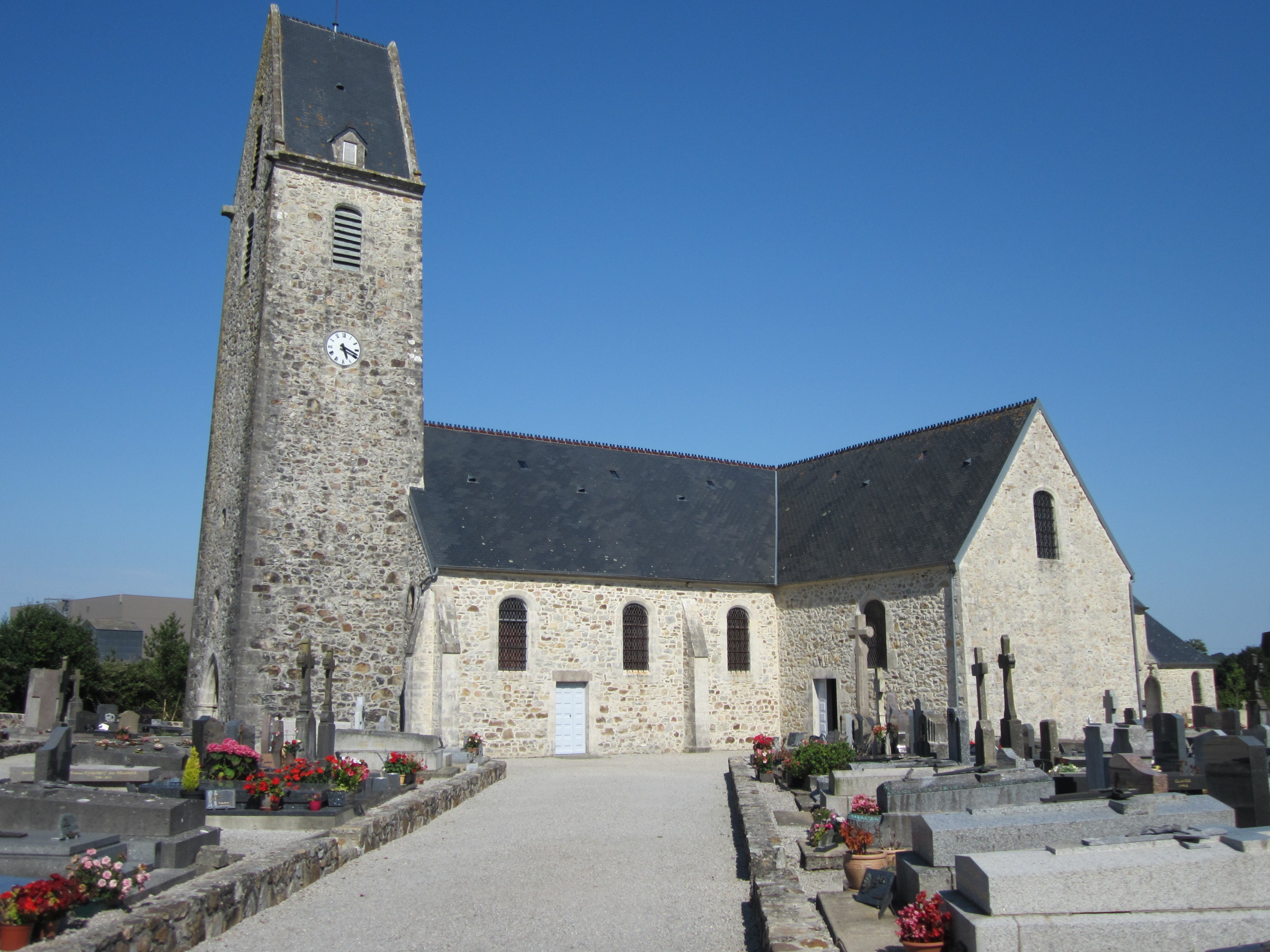 église Saint-Hermeland de Sottevast, Manche